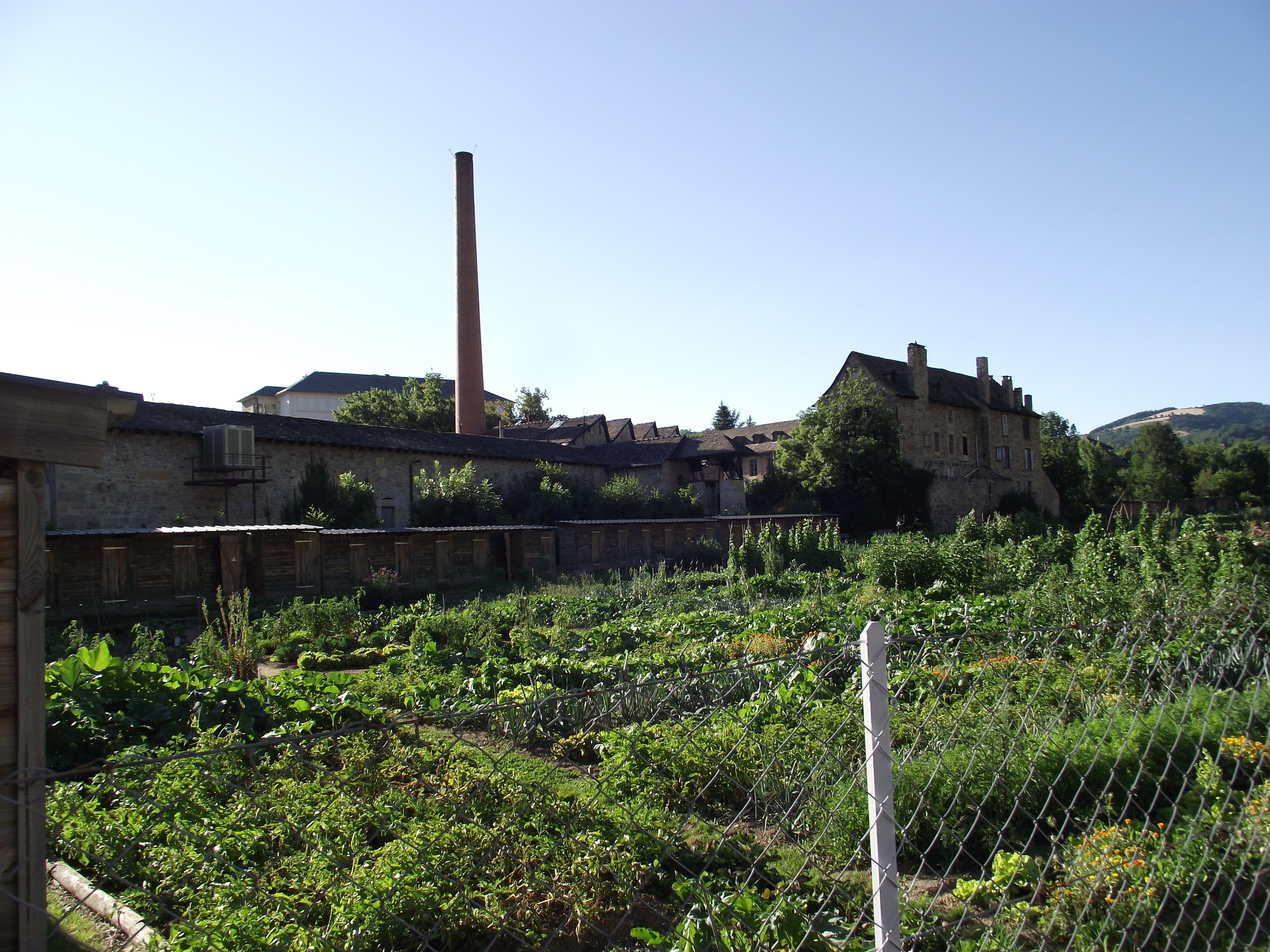 Ancienne usine textile à Marvejols (Lozère), quartier de Pineton.